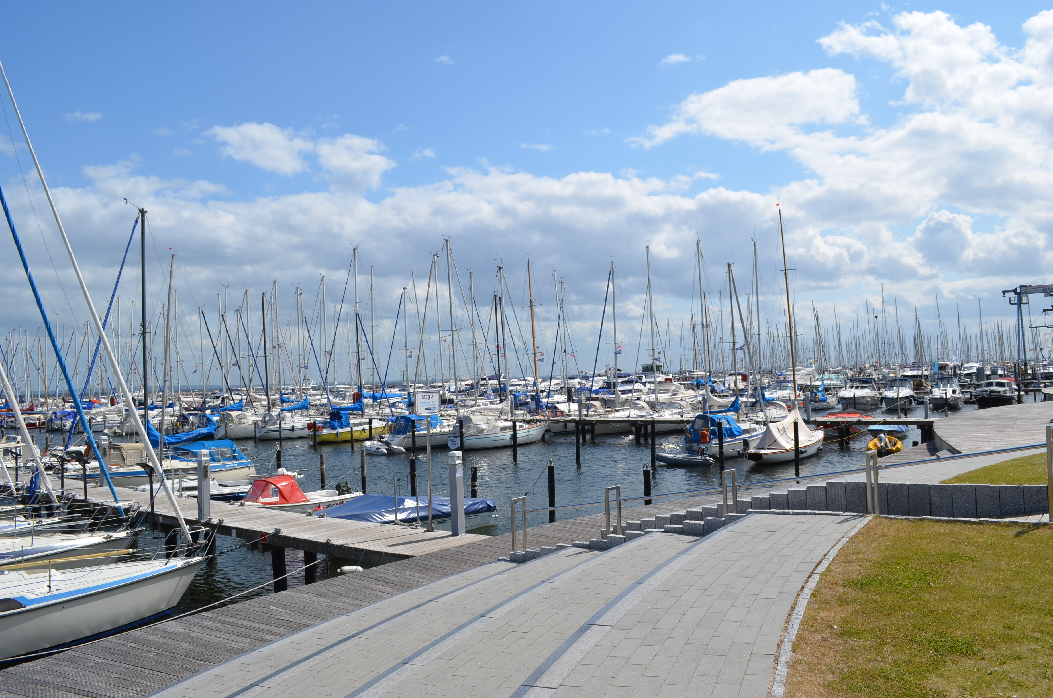 Grömitz, der Hafen 10